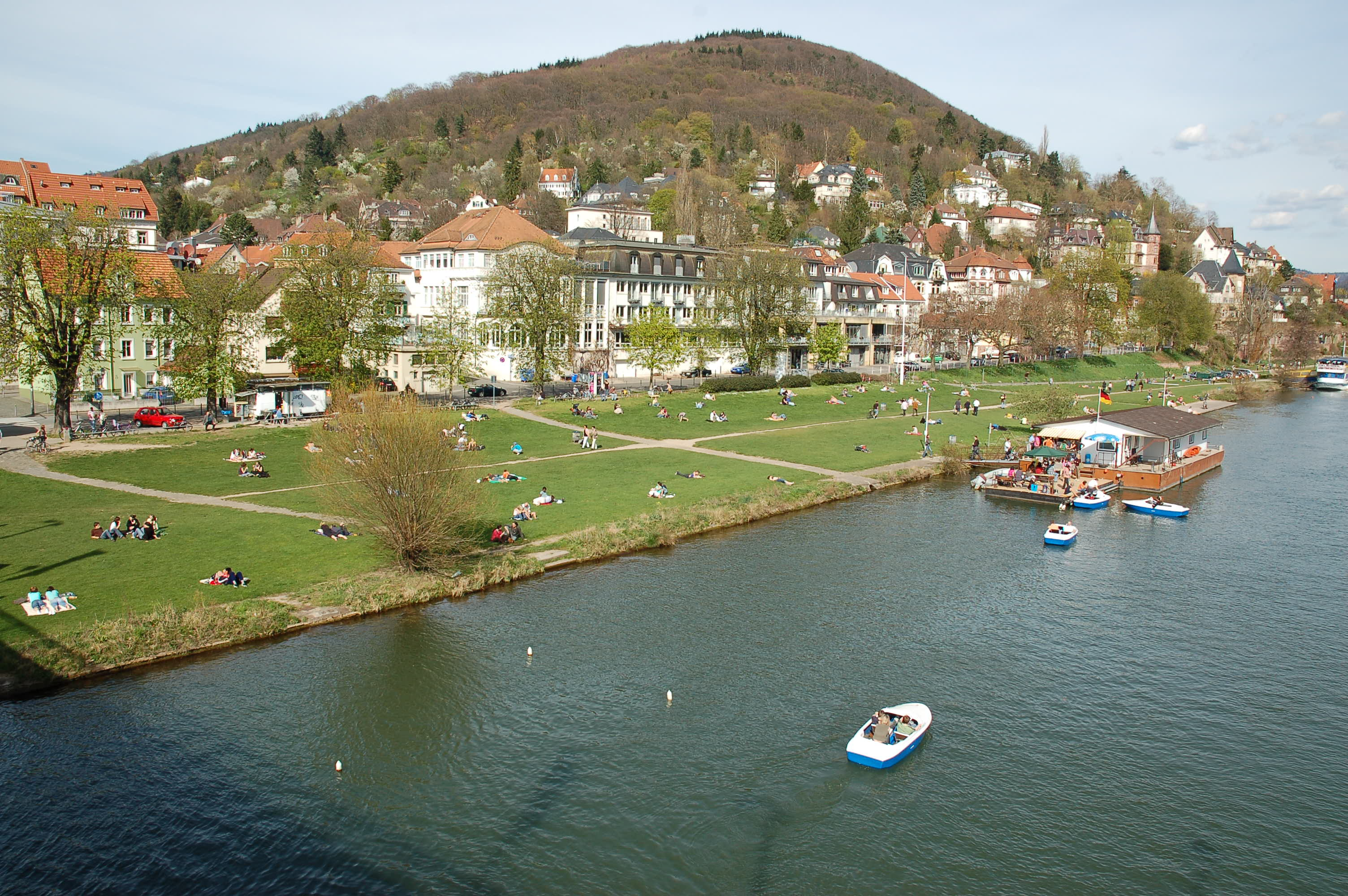 Neckarwiese in Heidelberg-Neuenheim